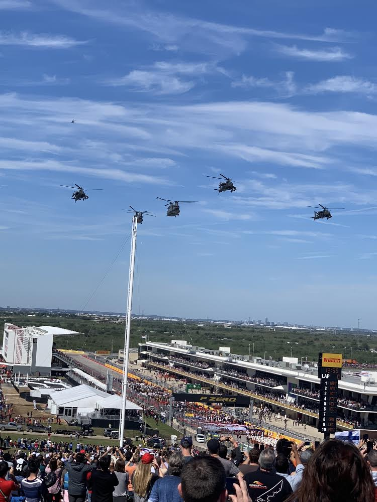 Nederlandse helikopters, 3 Apaches en 2 Chinooks, voerden vandaag in pijlformatie een fly-by uit over de pitstraat van het Circuit Of The Americas (COTA) in Austin. Dat gebeurde direct na het spelen van het Amerikaanse volkslied en voor het begin van de Formule 1 Grand Prix.